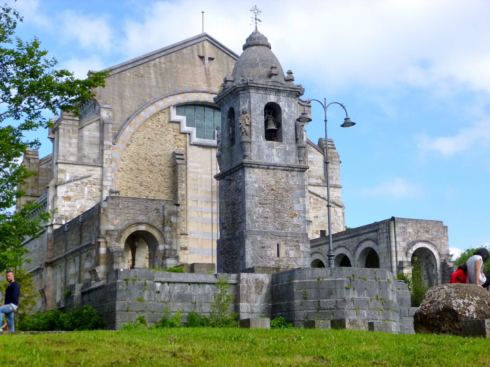 Santuario de Urkiola (Bizkaia)